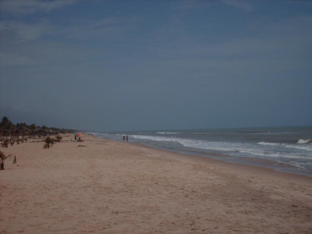 Playa de Itsmo Caribe, en Boca de Uchire, Anzoátegui-Venezuela